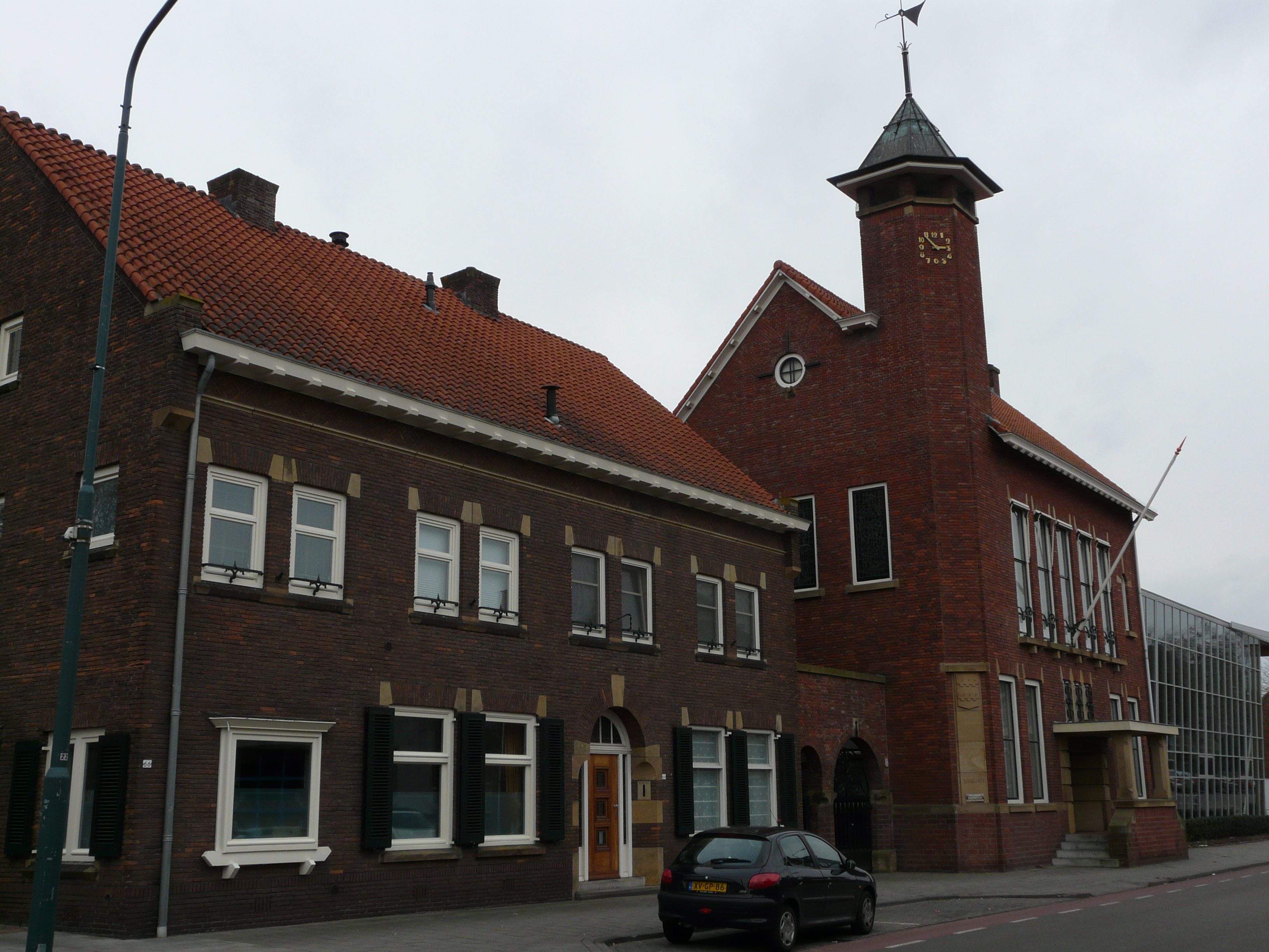 Zicht op een deel van het oude gedeelte van het Gemeentehuis van Dongen